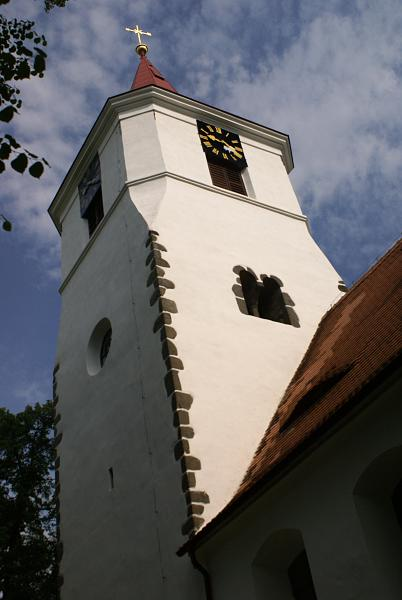 Věž farního kostela svatého Mikuláše se sdruženými románskými okny